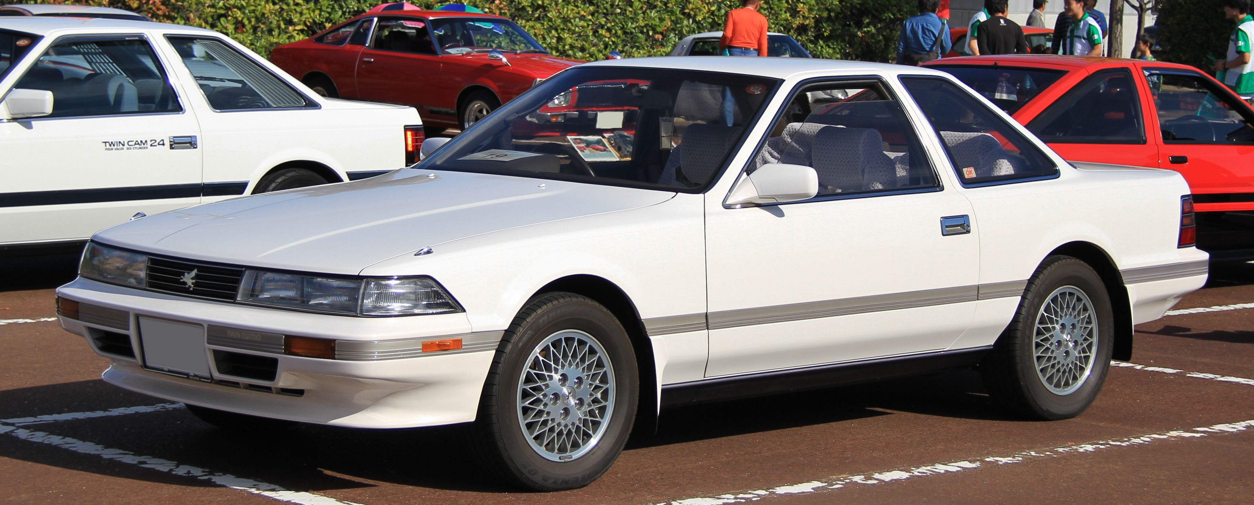 Toyota GZ20